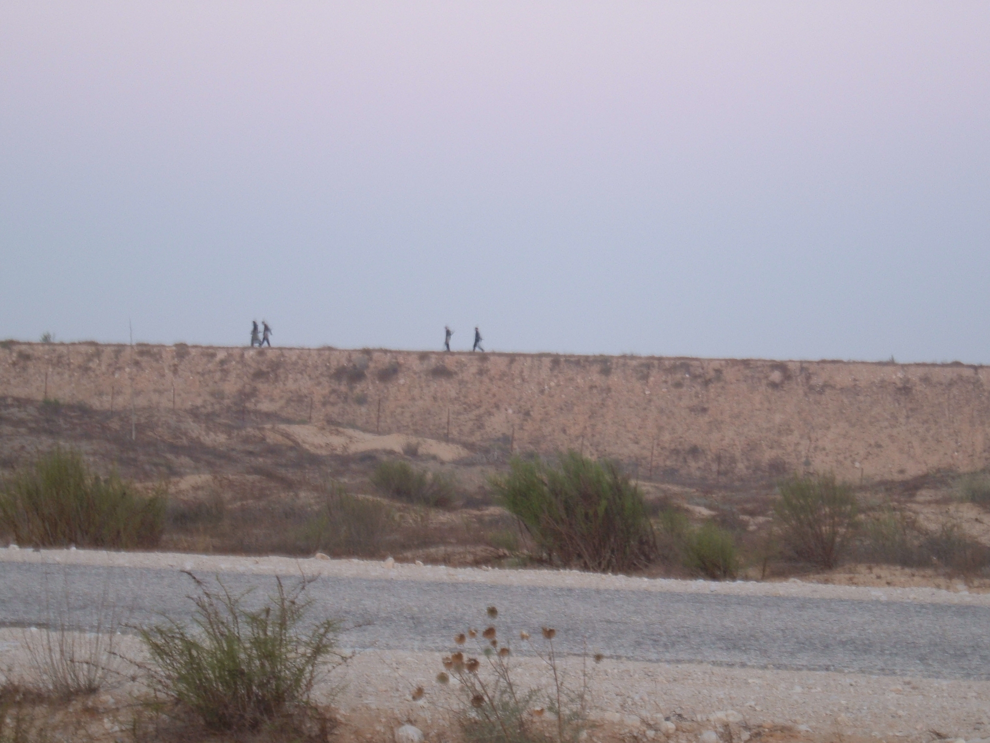 חיילים מצריים מפטרלים לאורך גבול ישראל-מצרים, צולם על ידי חייל צה"ל ביולי 2005.